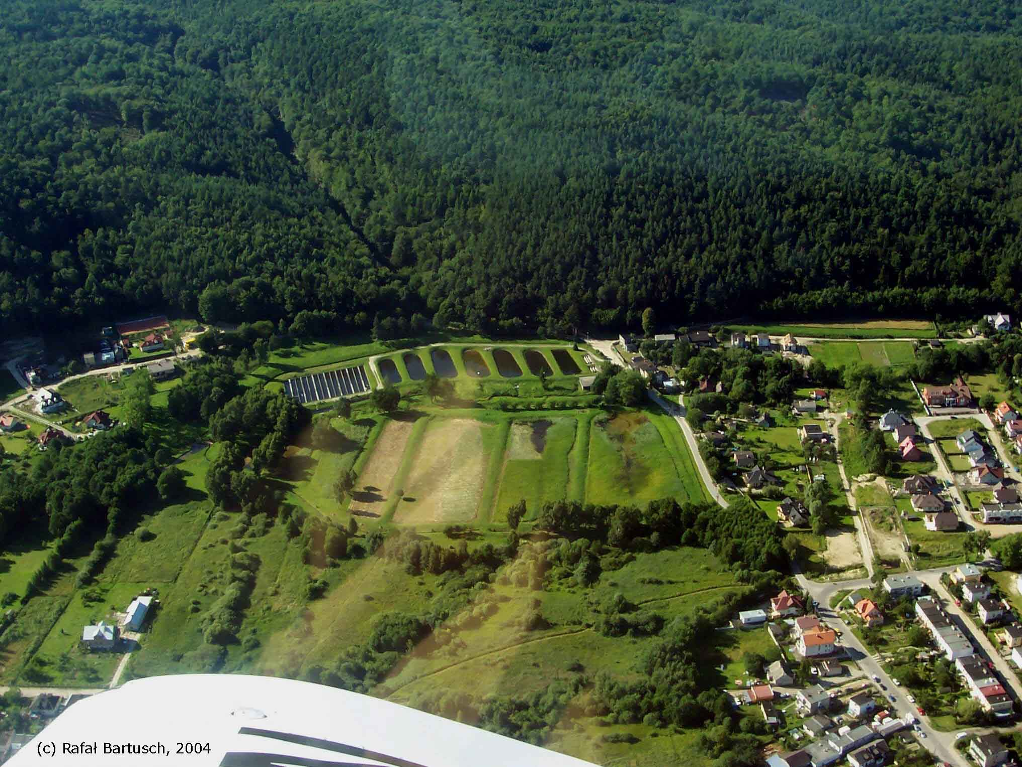 Szmelta, Hodowla Pstragow